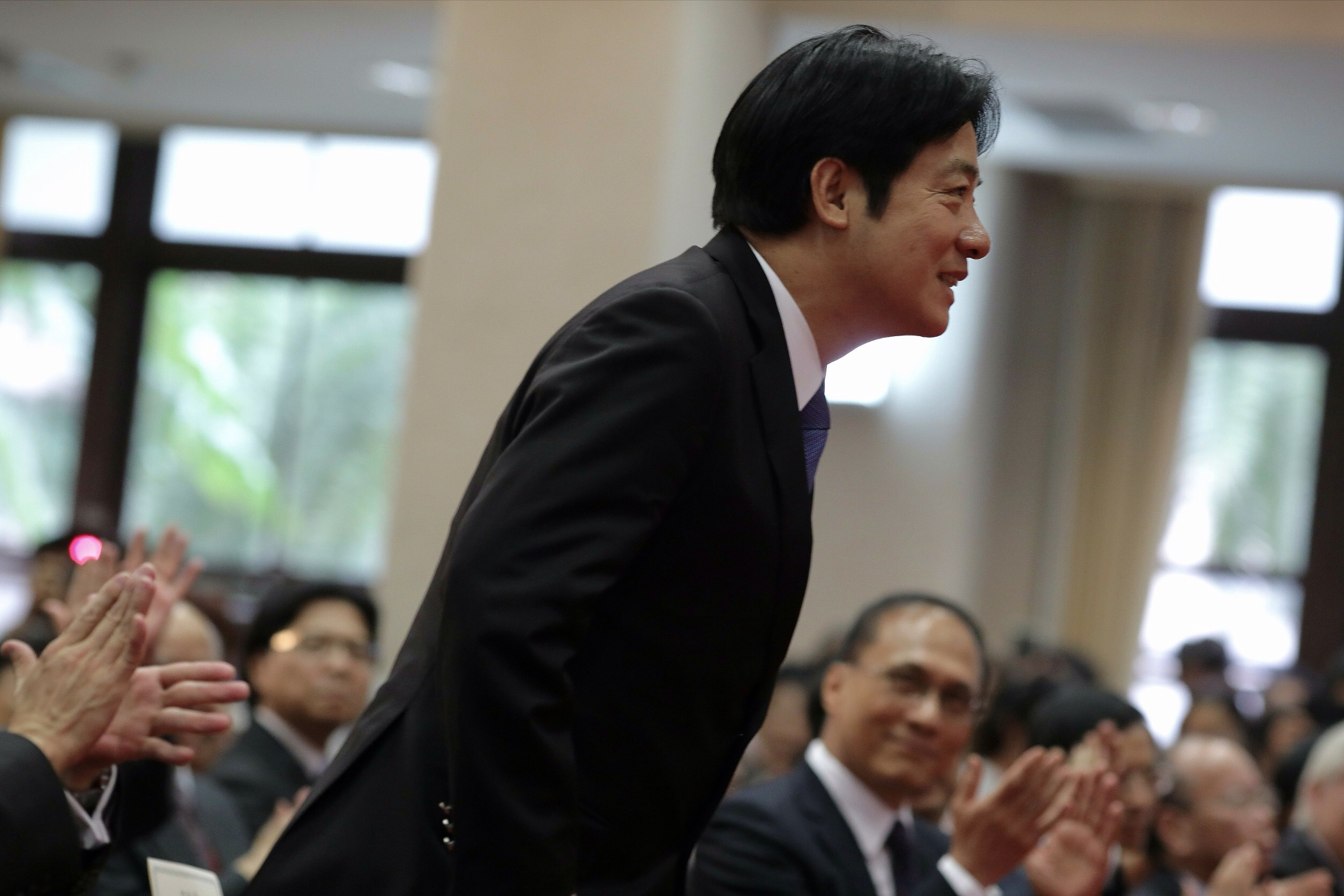 新任行政院院長賴清德出席「行政院聯合交接典禮」